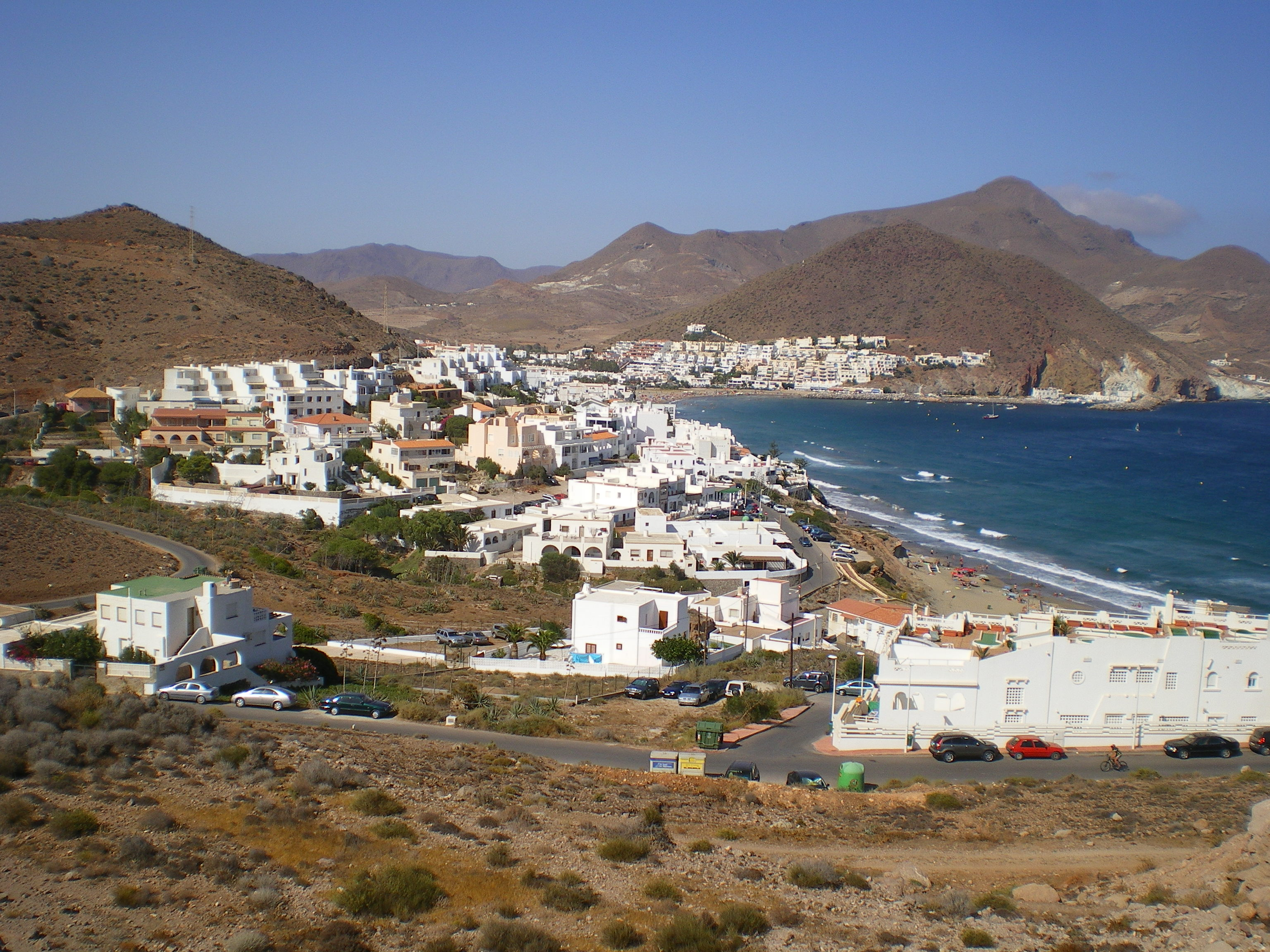 Fotografía de la pedanía de San José, municipio de Níjar, provincia de Almería, España. Tomada desde el oeste.